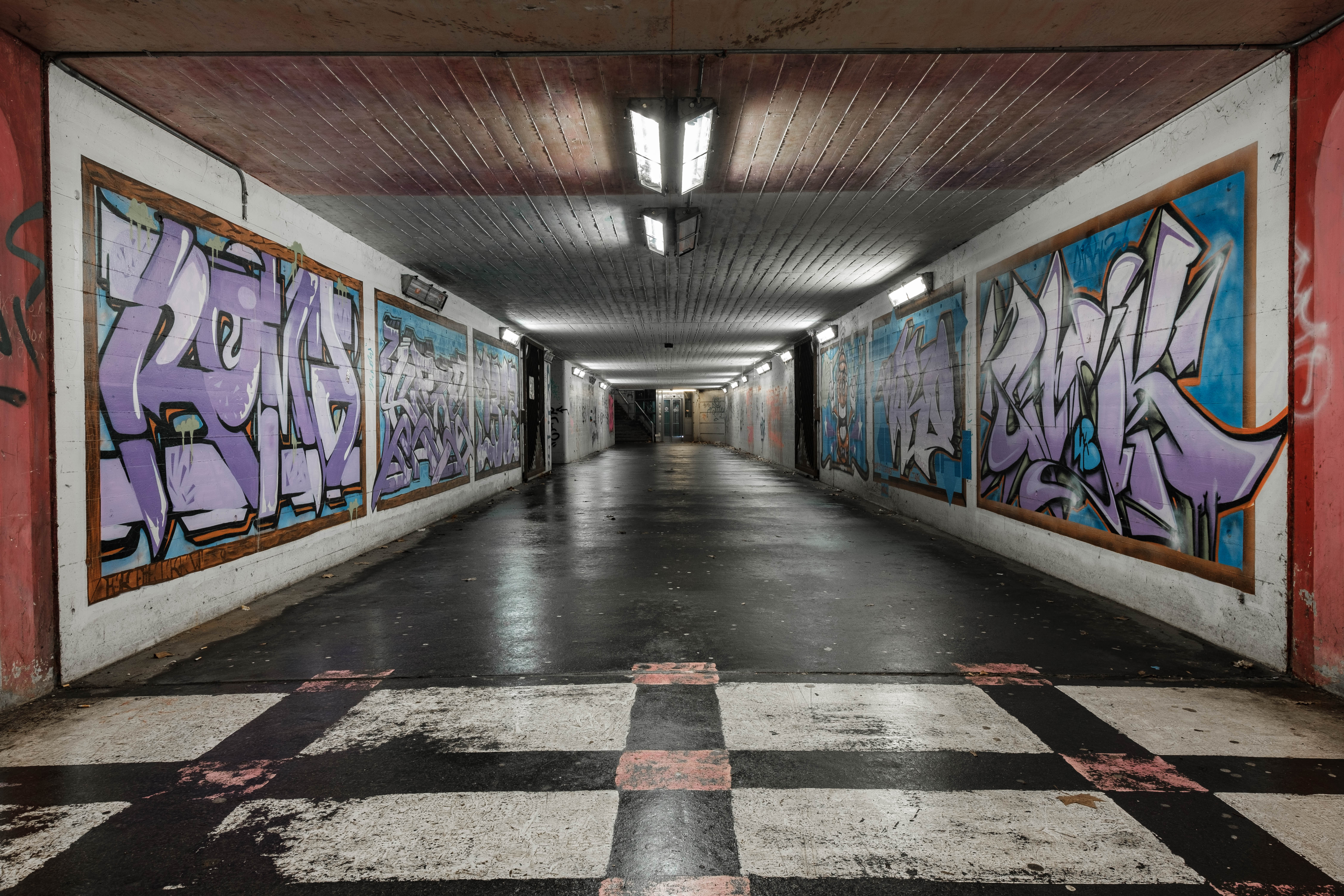 Fußgängerunterführung des Hauptbahnhofs in Tübingen